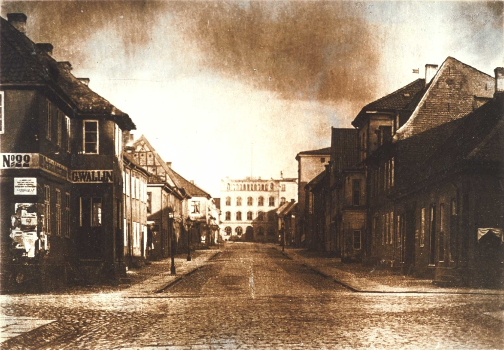 Parti fra Toldbodgaden, hjørnet Kongens Gade, ca. 1863. Rett frem i midten av bildet Nissens Pigeskole, oppført 1860.